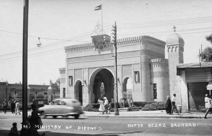 باب وزارة الدفاع العراقية في بغداد خلال فترة الحكم الملكي